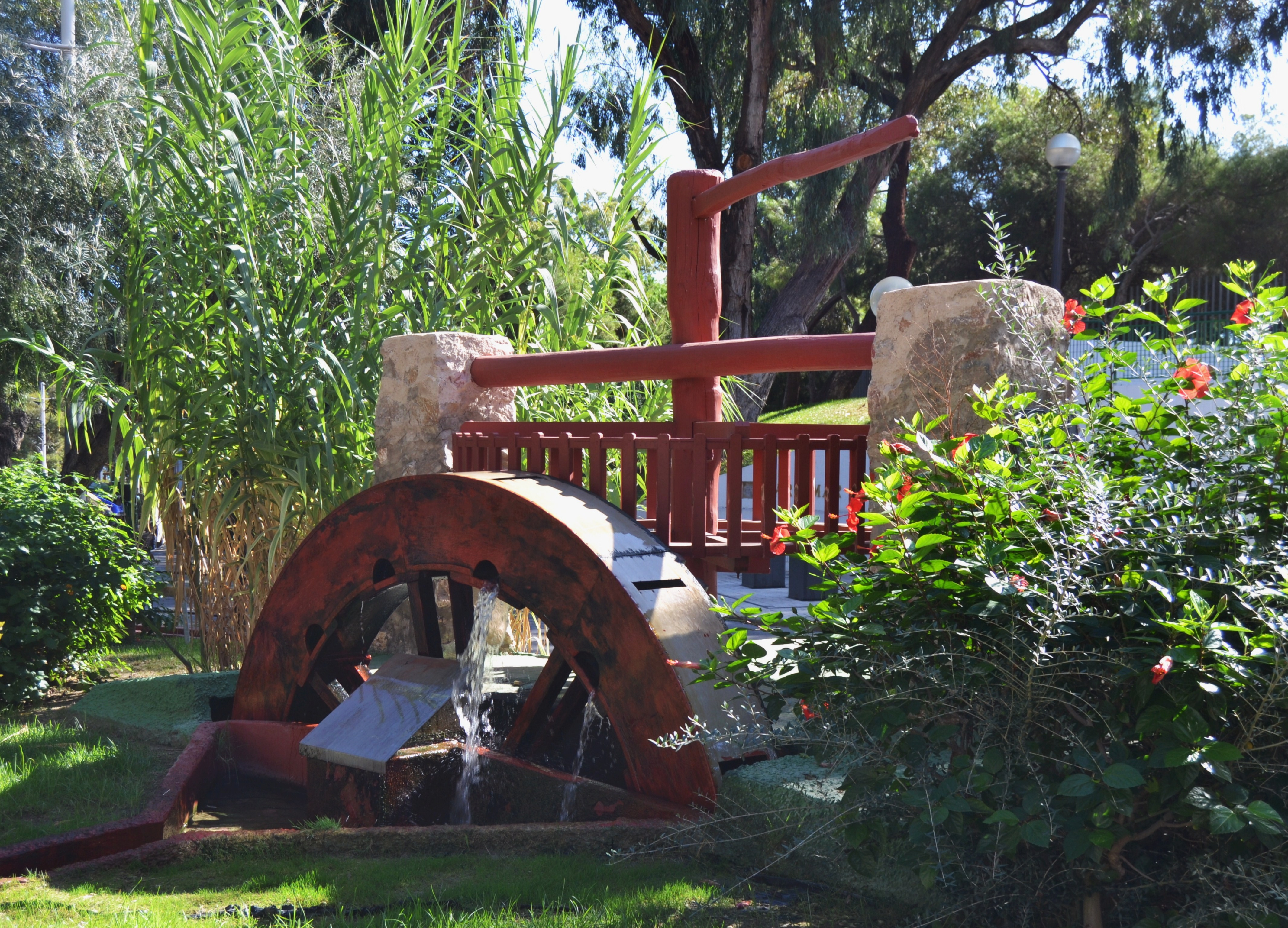 Sénia del riu Sec, Guardamar del Segura.